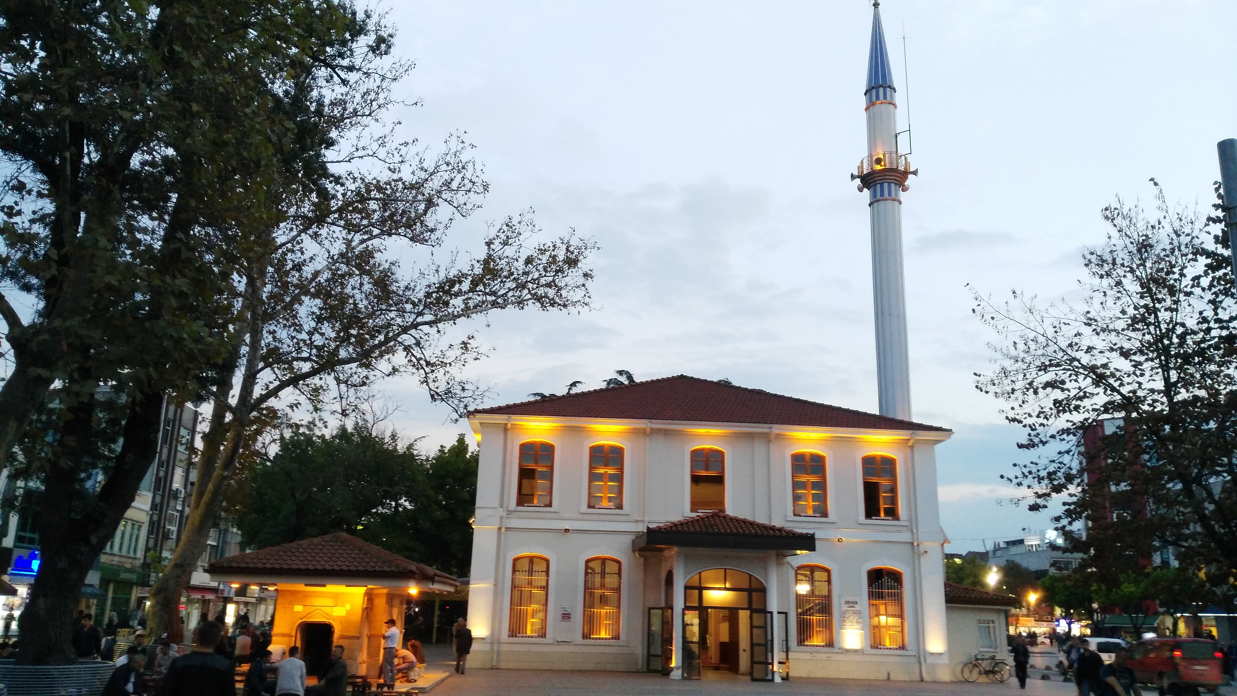 Adapazarı merkezde Orhan Gazi adına yapılmış tarihi cami.